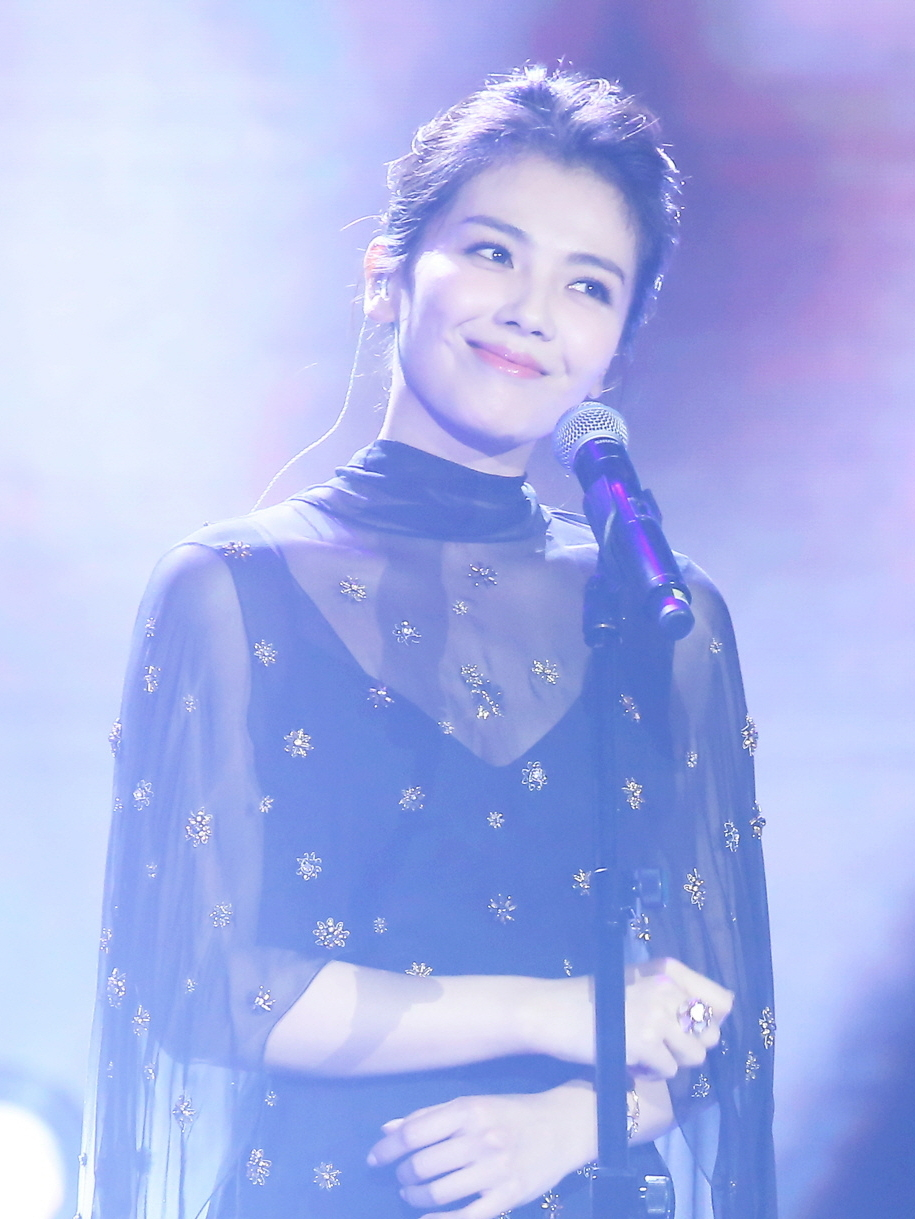 上海 微博电影之夜 刘涛